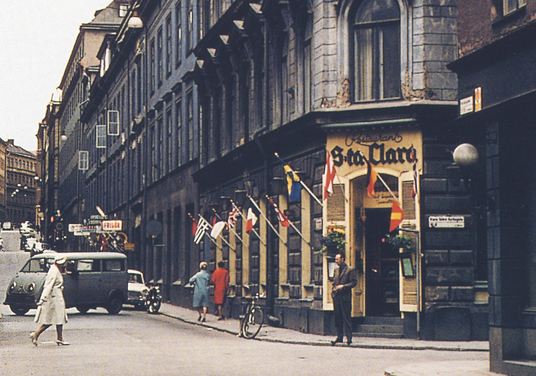 Hörnet av Klara Södra Kyrkogata 12 och Herkulesgatan 26. T.h. ligger Restaurang S:ta Clara vid Klara Södra Kyrkogata 10.